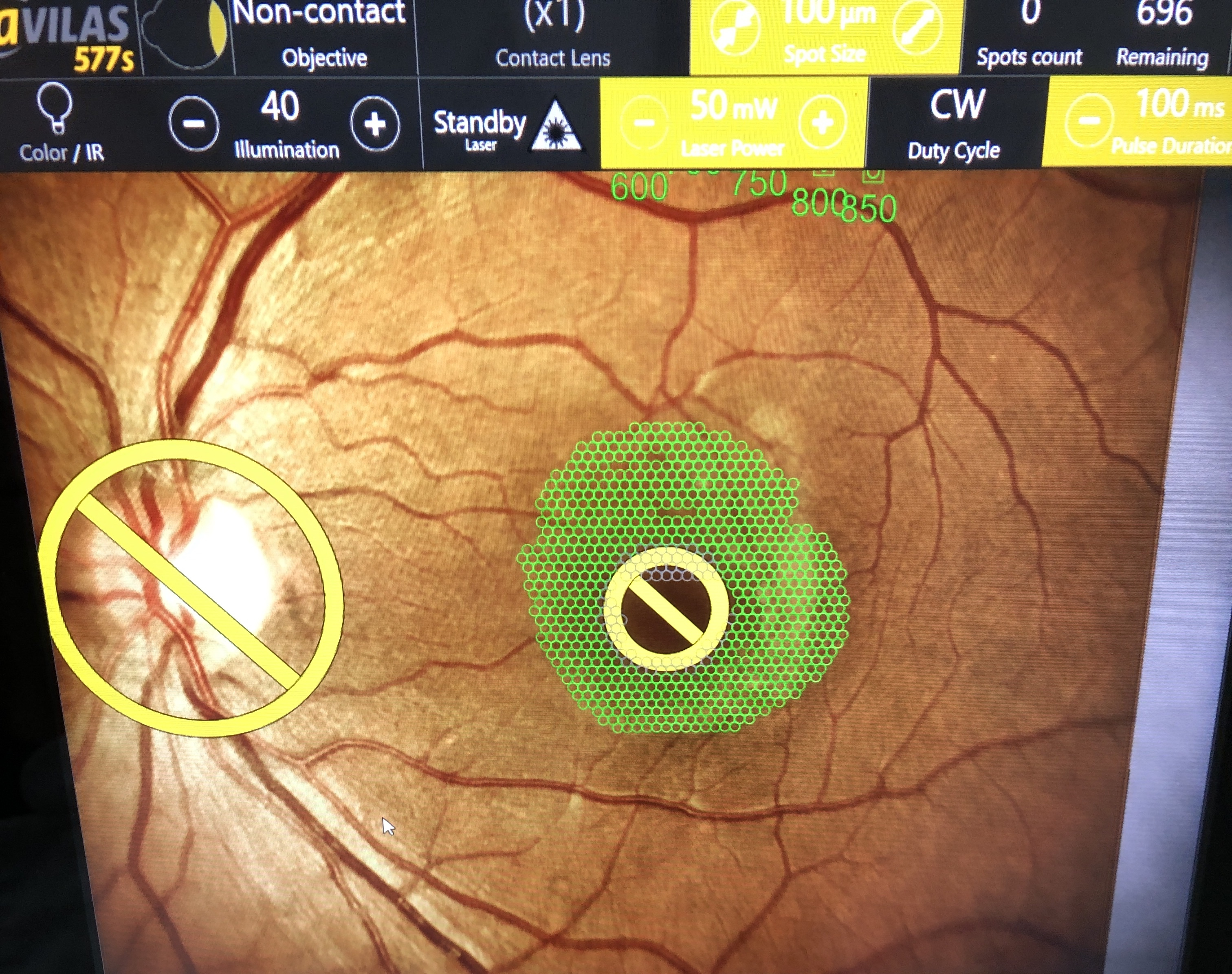 На картинке виден этап наложения составленного плана на живое изображение сетчатки. Зоны работы лазера выделены зелеными точками, зоны запрета выделены желтыми знаками запрета. В данном случае проводится субпороговая коагуляция сетчтатки, не вызывающая повреждения фотосенсорных клеток.